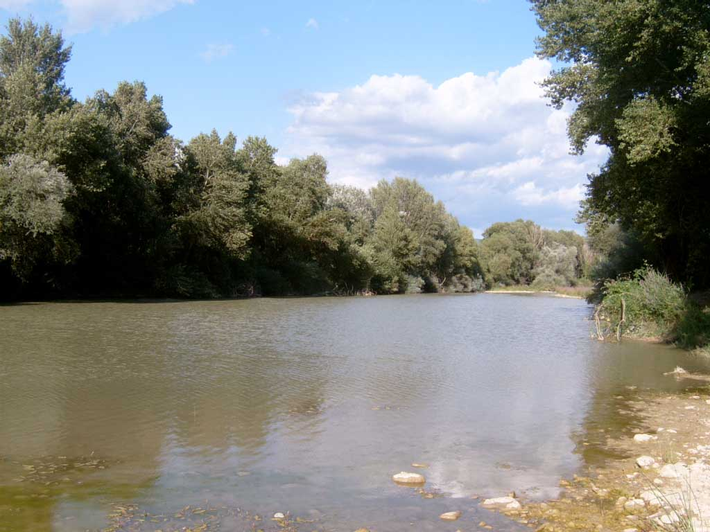 Il fiume Ombrone nei pressi della frazione di Arcille (GR).